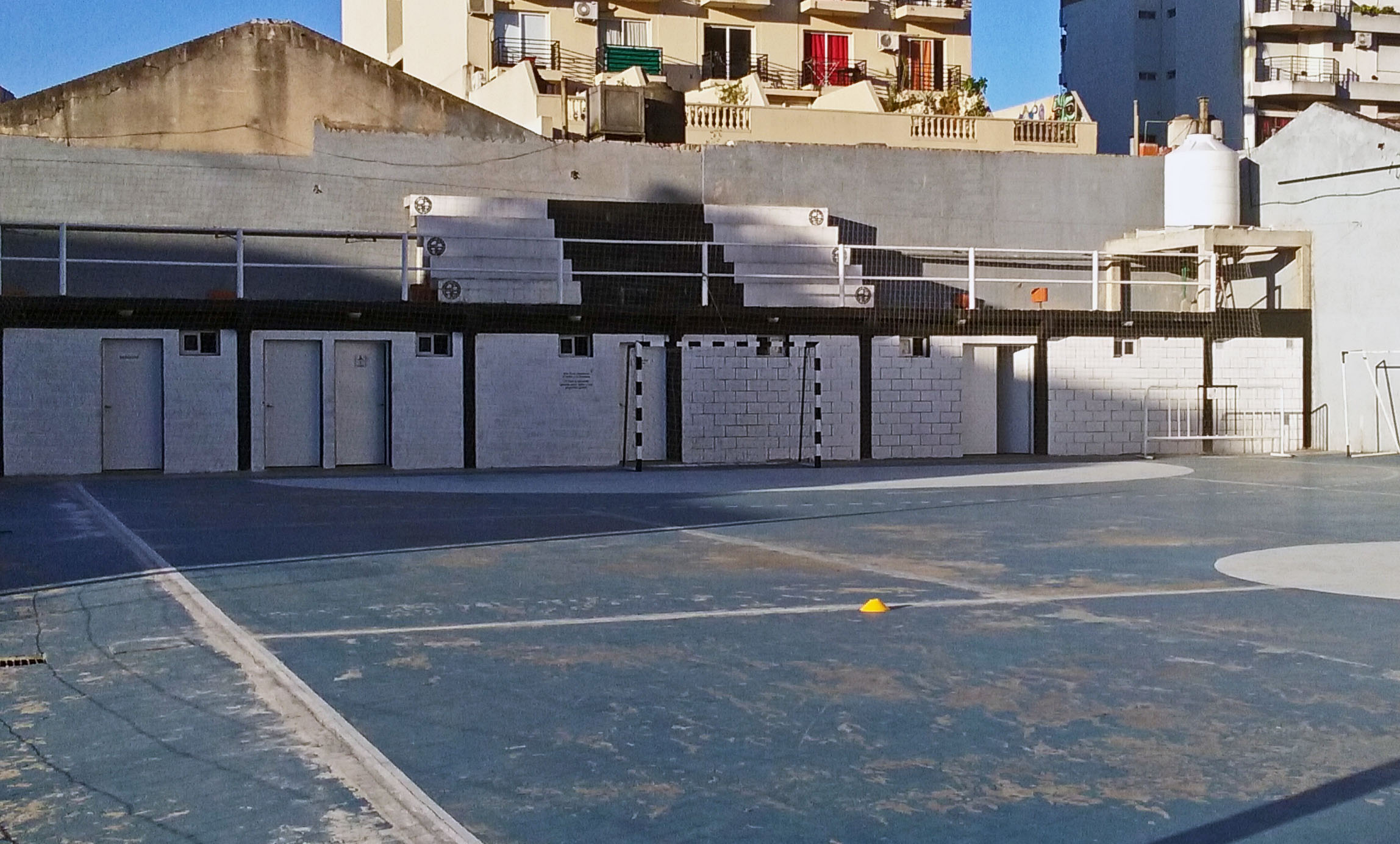 Fotografía del interior del Predio Don Fernando Sánchez tomada con mi Samsung Galaxy Core Prime Duo